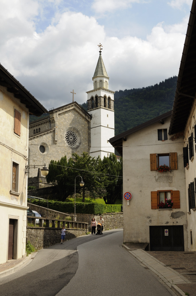 Paluzza, scorcio della cittadina con il Duomo di Santa Maria.